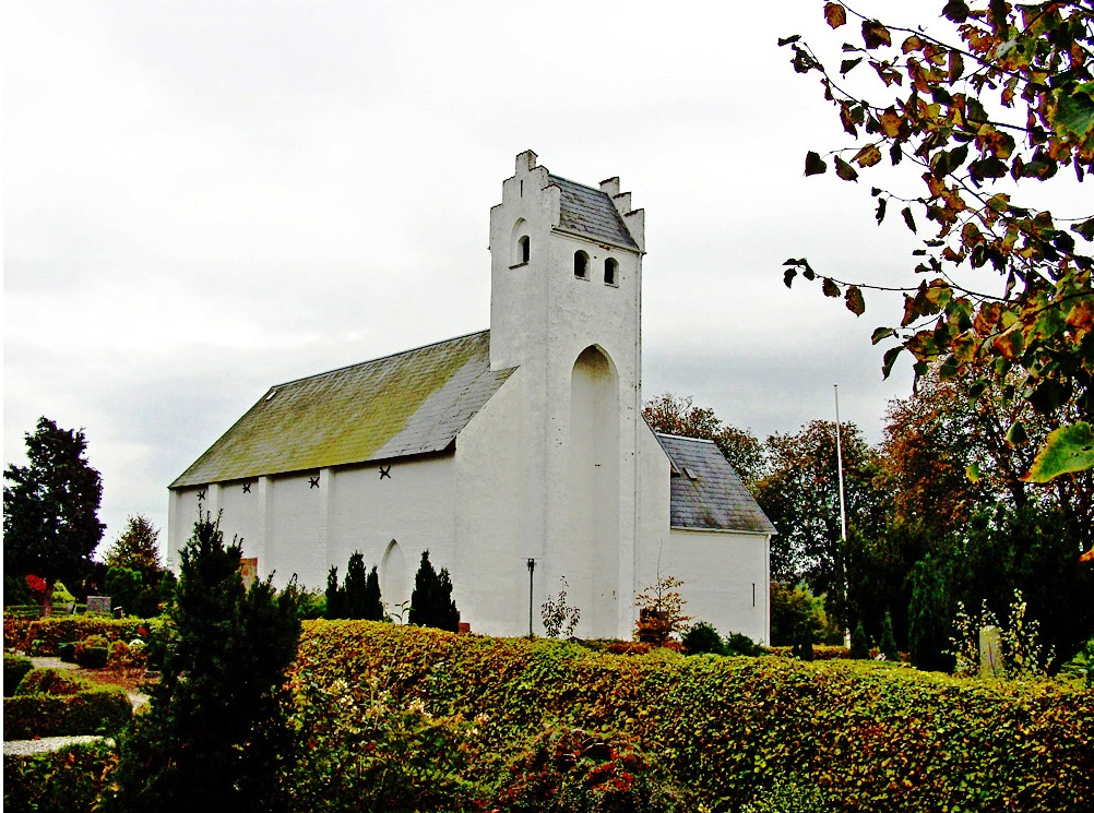 Albøge kirke (Norddjurs) - fra nordvest